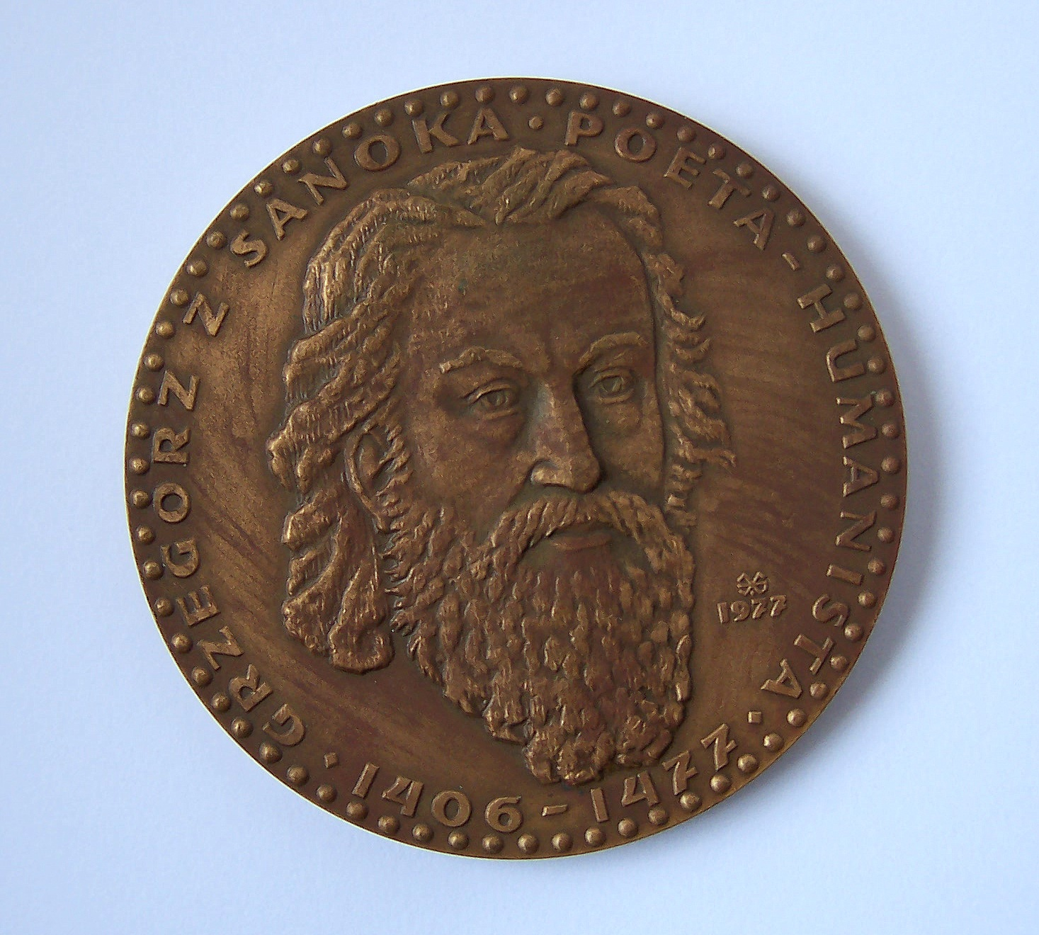 Medal pamiątkowy z podobizną Grzegorza z Sanoka (1477-1977) zaprojektowany przez Edwarda Gorola z okazji obchodów 500. rocznicy jego śmierci i wytłoczony przez Mennicę Państwową w liczbie 500 egzemplarzy.